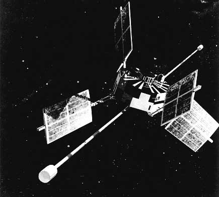 Explorer-34 (IMP-F) satellite